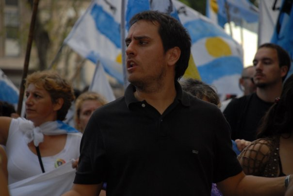 El legislador por la Ciudad de Buenos Aires Juan Cabandié en una marcha.